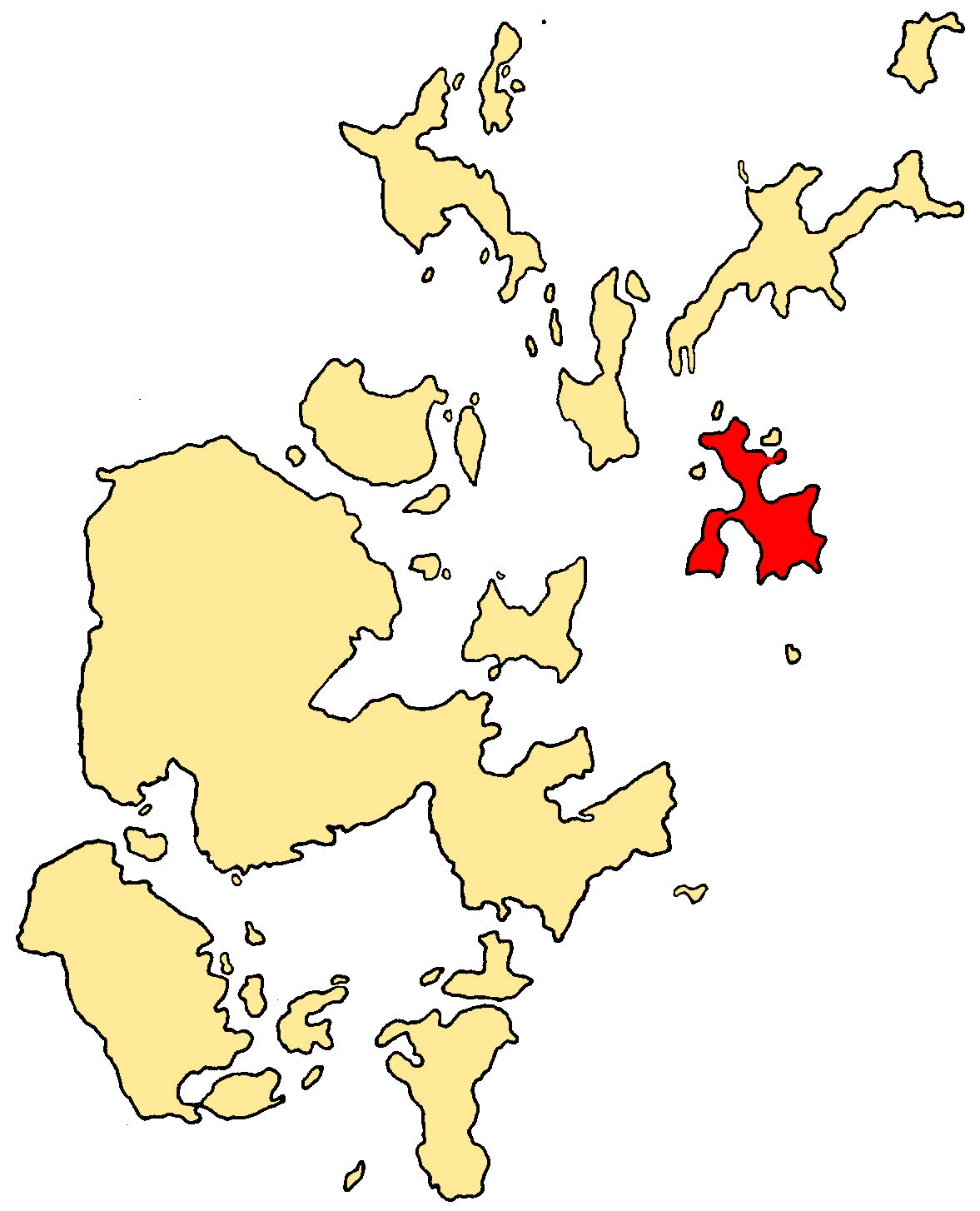 Stronsay